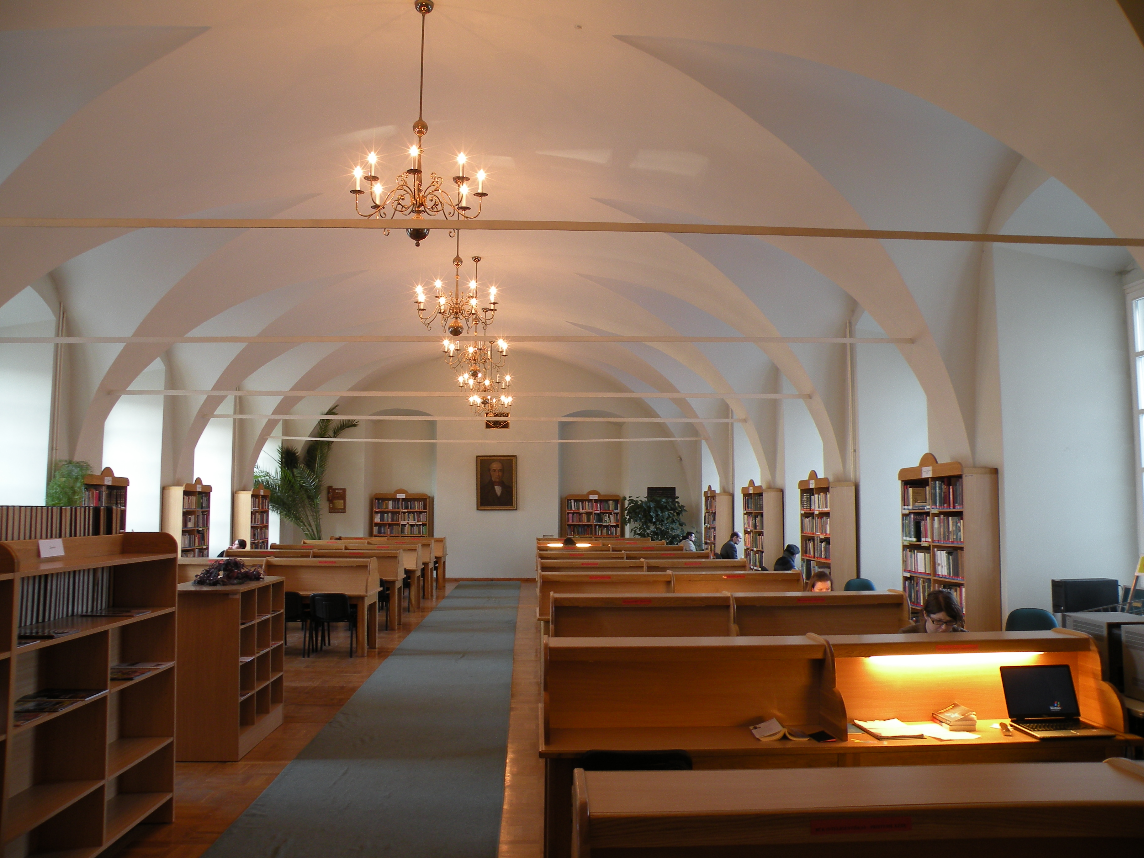 VU bibliotekos bendroji skaitykla